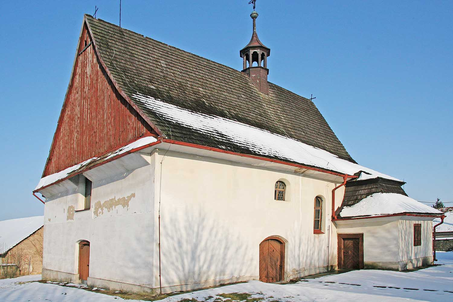 Dřevěný kostel Sv. Markéty ve Vysočanech u Nového Bydžova